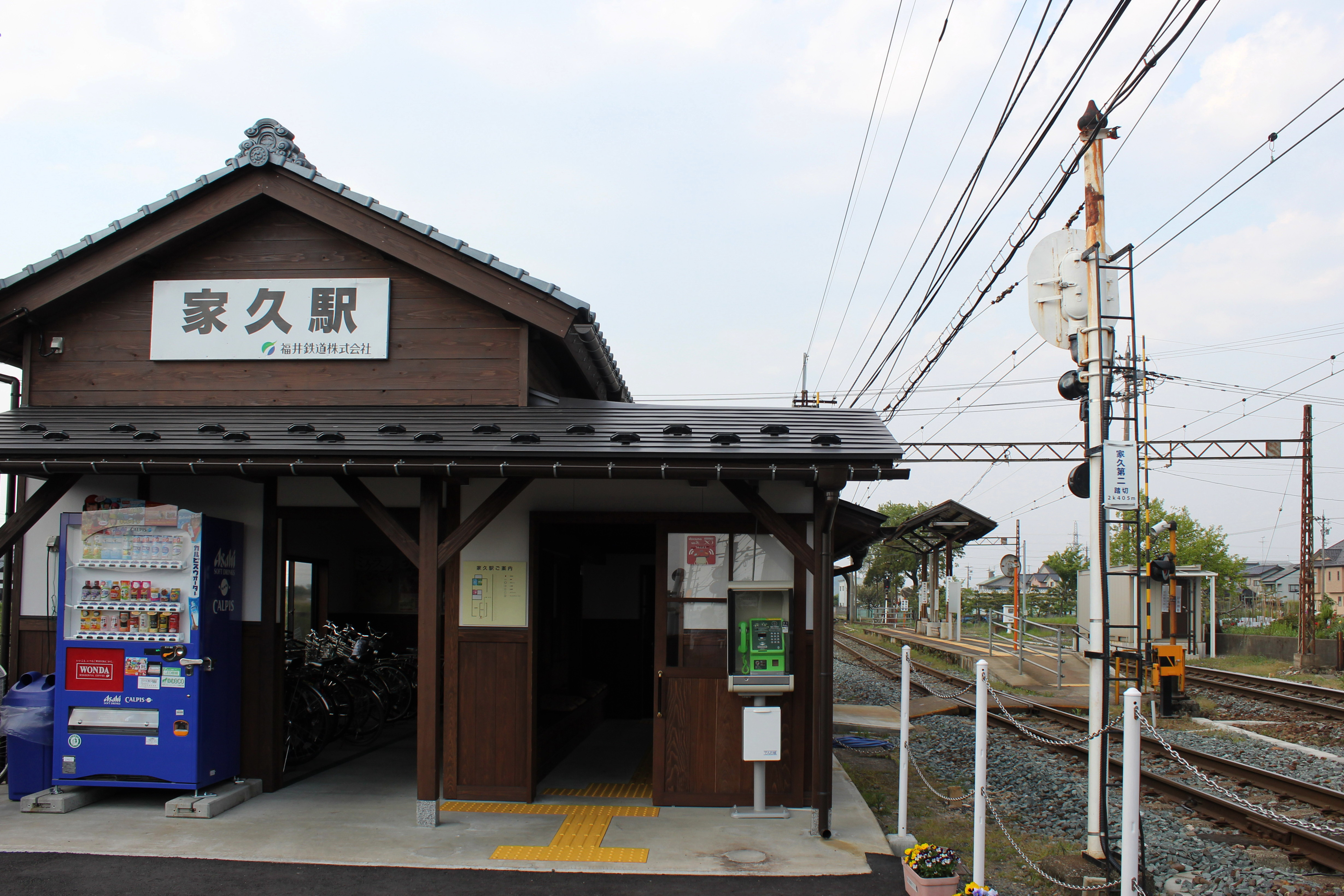 家久駅（福井鉄道）